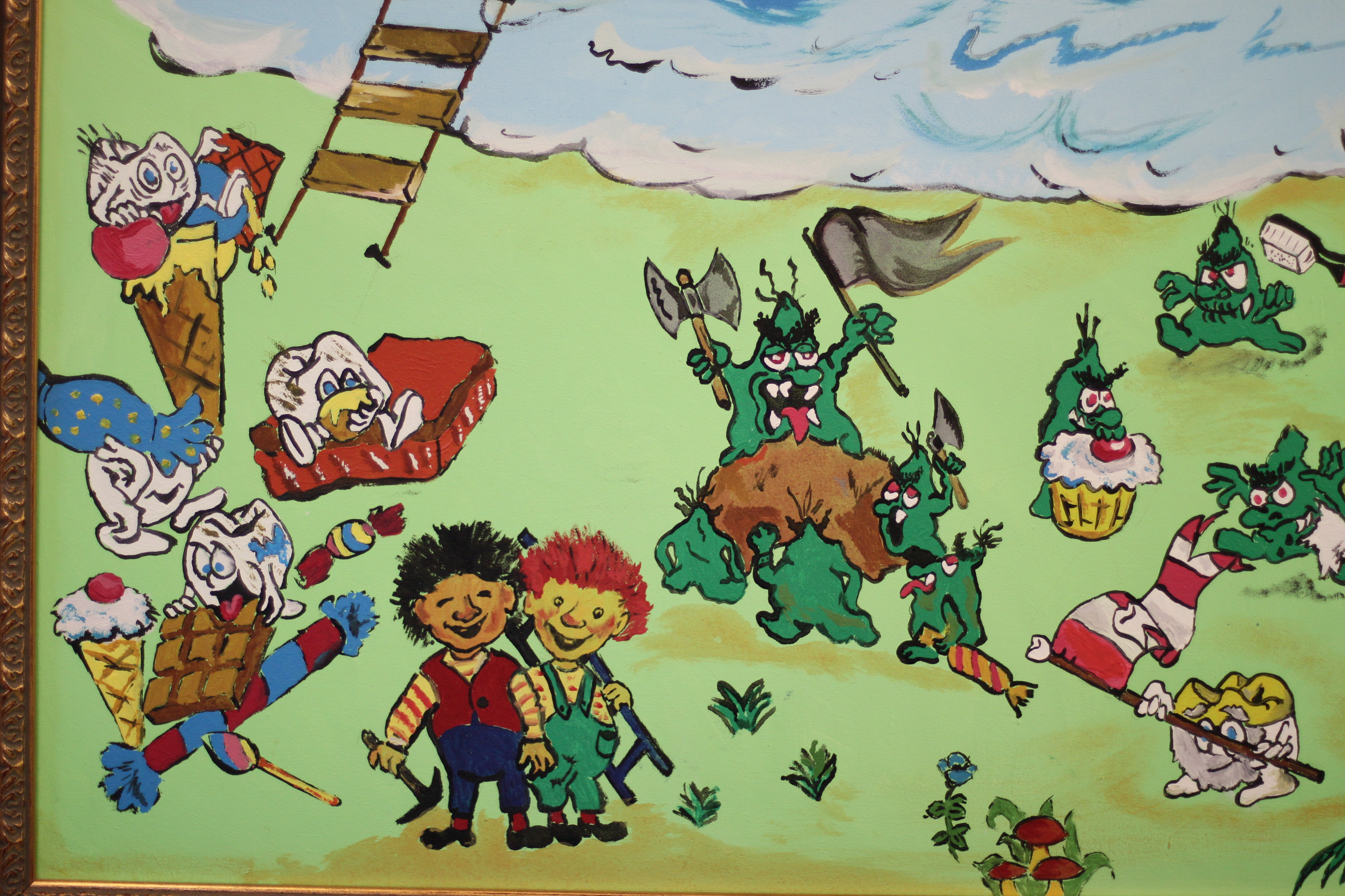 Karius und Baktus; eigene Zeichnung, Ölbild - in eigenem Besitz, die Figuren sind der Kinderbuchillustration zu Karius und Baktus nachempfunden